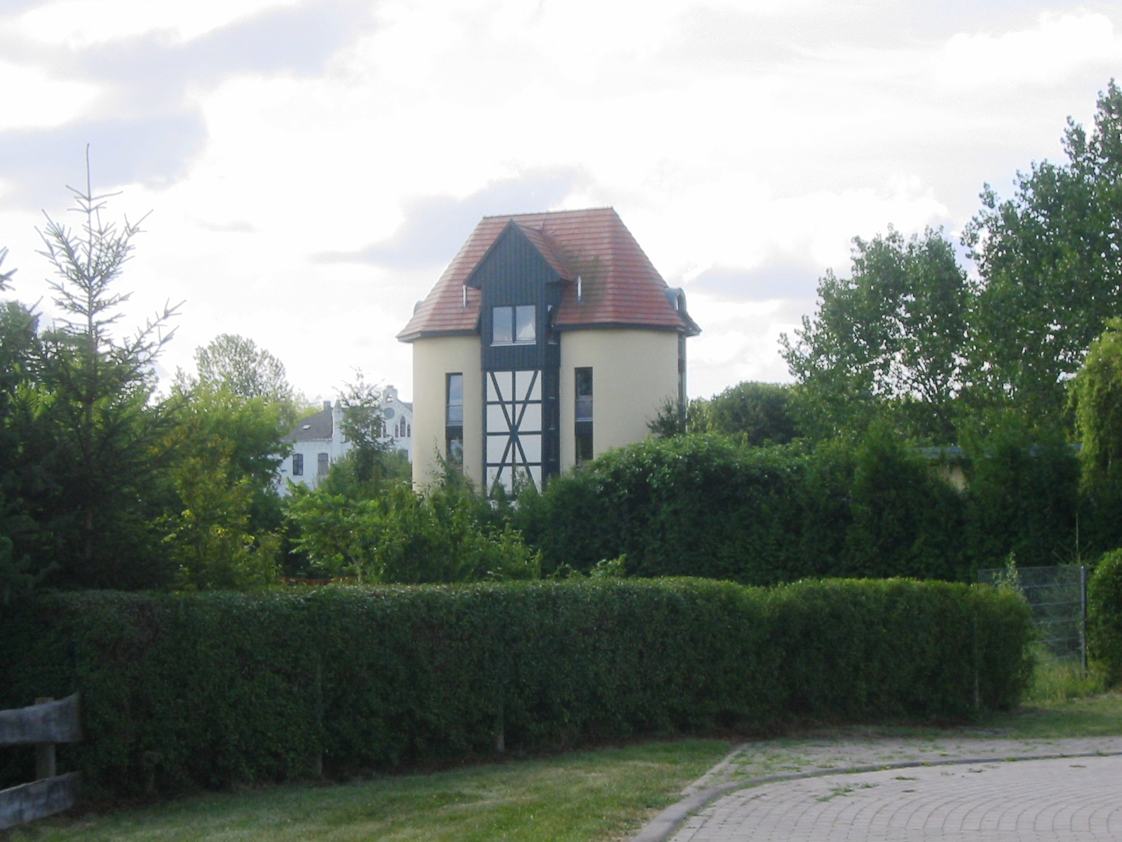 Denkmalgeschützter ehemaliger Futtersilo in Klein Kussewitz, umgebaut zu einem Wohngebäude; Blickrichtung nach Süden